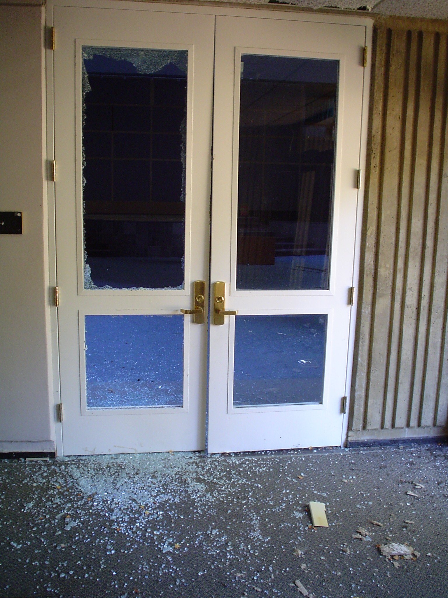 Vandalised door